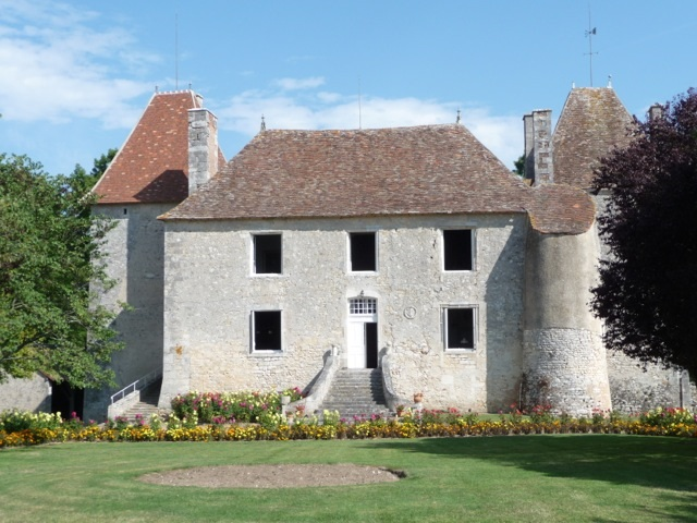 Photographie du château du Ry-Chazerat à Journet, dans la Vienne (Poitou -Charentes)